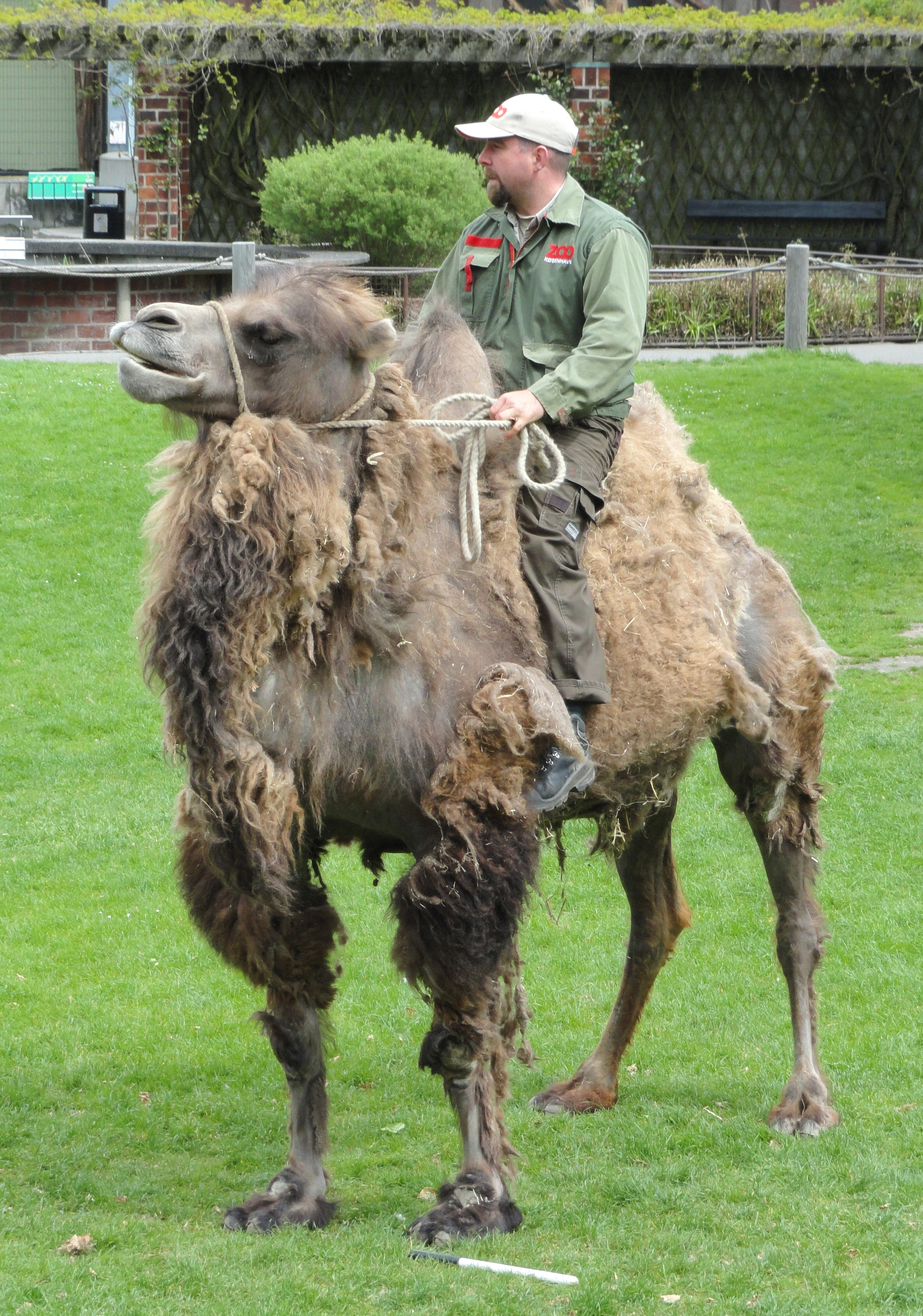 Copenhagen Zoo, Frederiksberg, Copenhagen, Denmark.